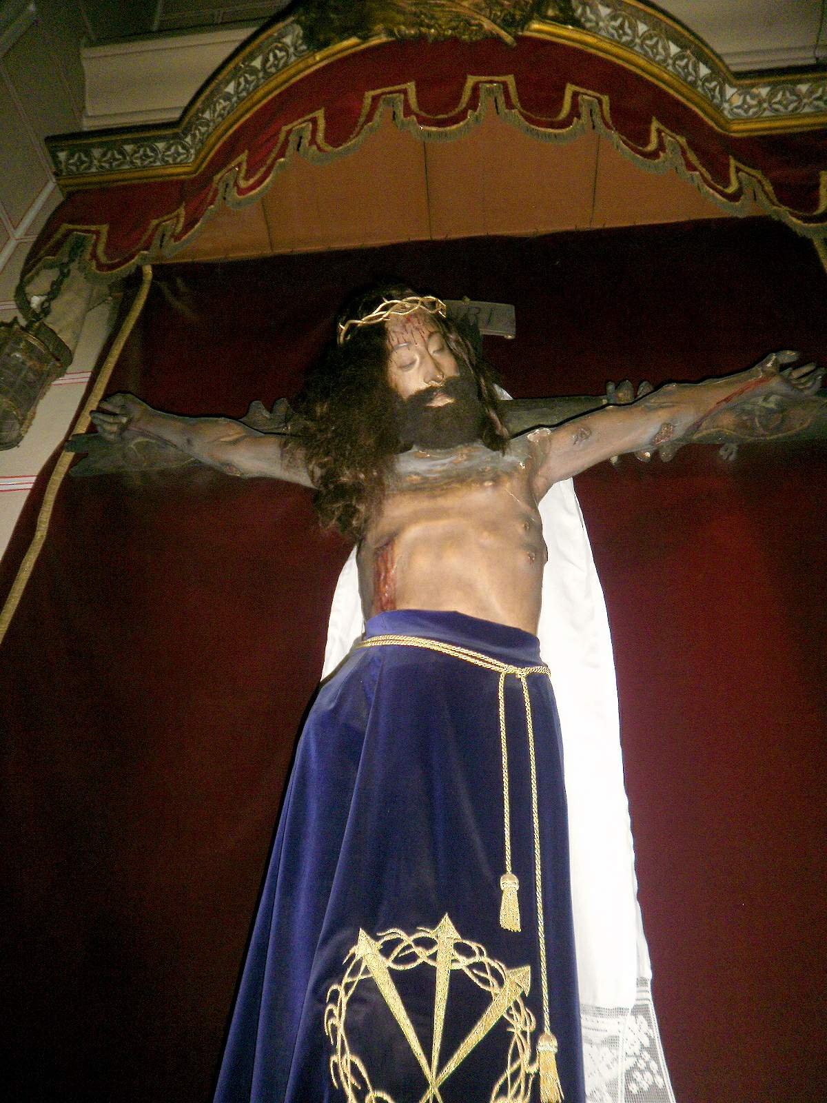 Church of San Juan el Real, Oviedo